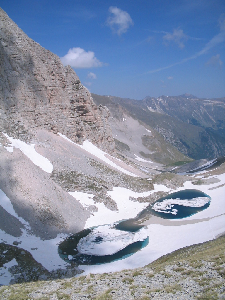 I laghi di Pilato a fine primavera